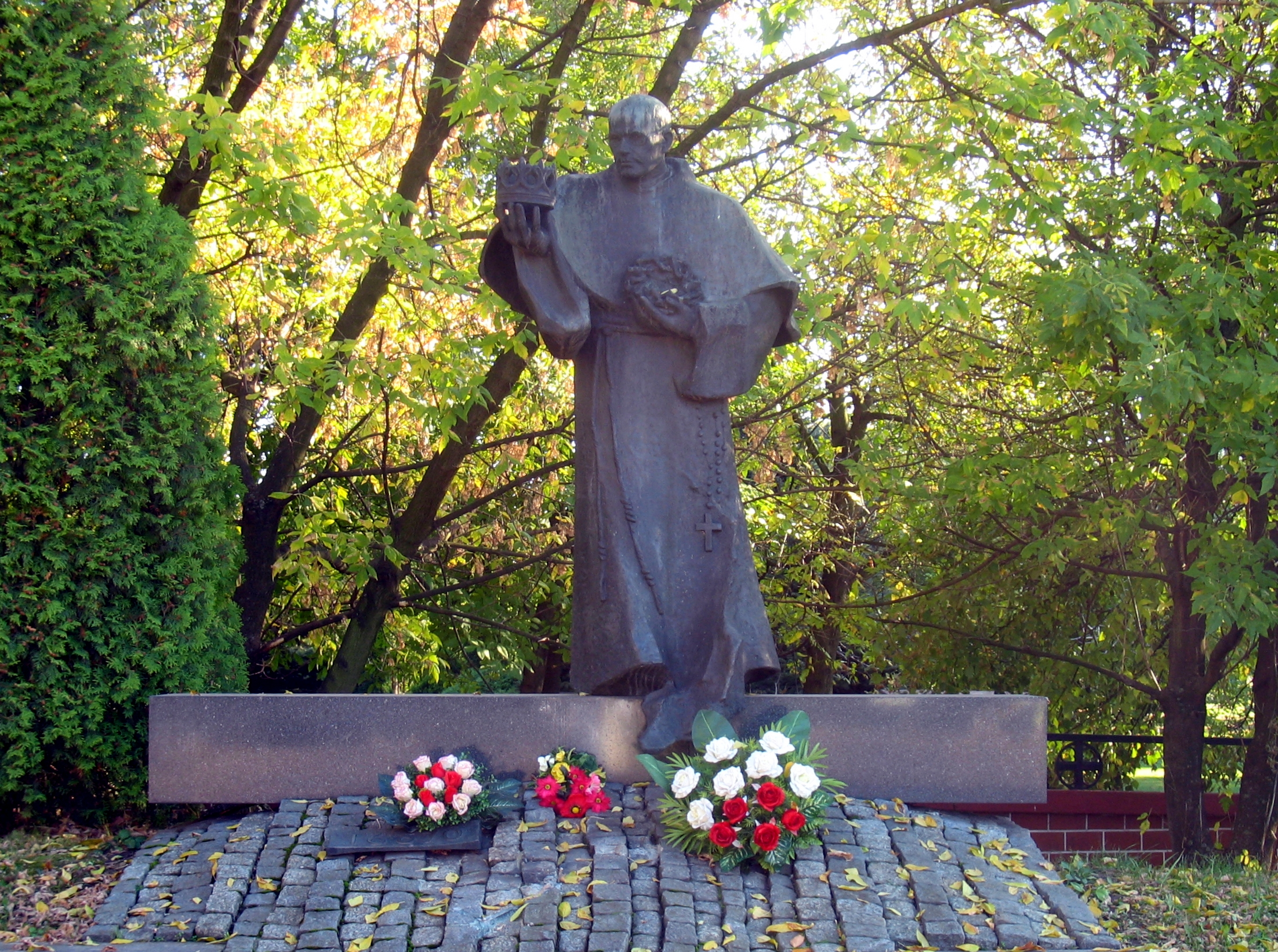 Pomnik św.Maksymiliana Marii Kolbego przy kościele św. Mateusza w Pabianicach - pierwszy pomnik św. Maksymiliana w Polsce